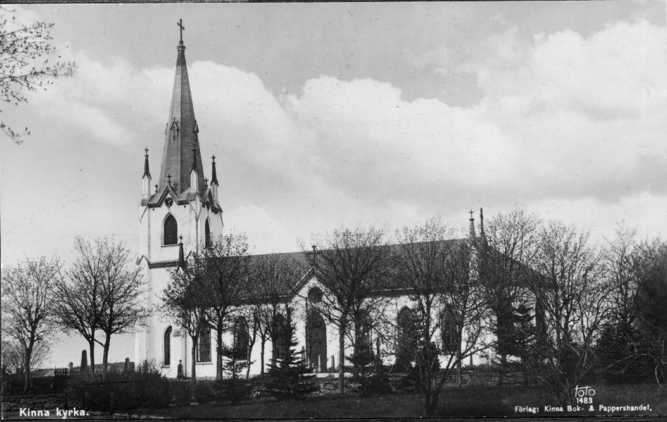 Kyrkan från sydöst. Vykort. Kategori: (01) ExteriörerKyrkan från sydöst. Vykort.